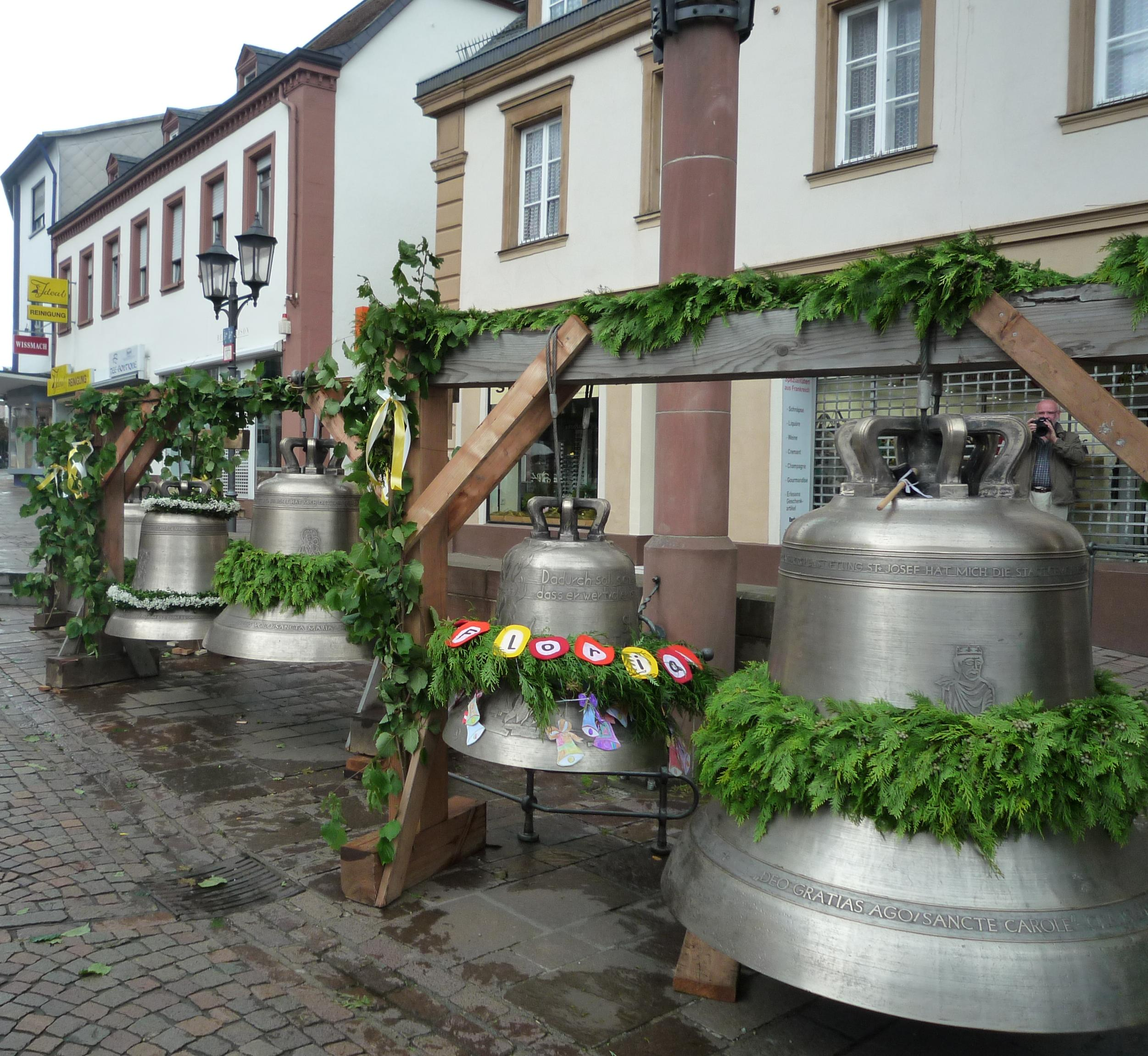 Neue Glocken für St. Josef in St. Ingbert im August 2011